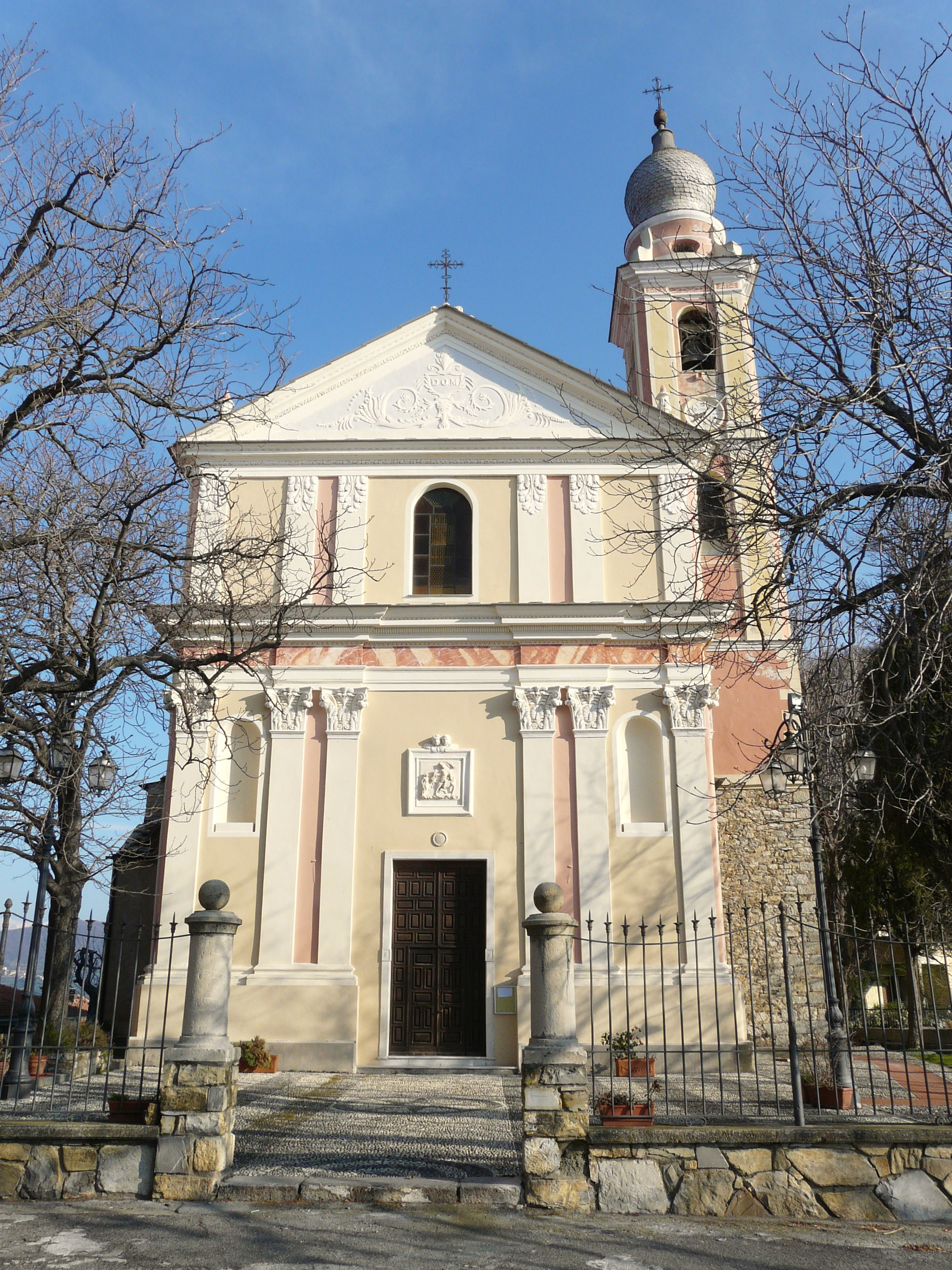 Chiesa di San Martino di Torria, Chiusanico, Liguria, Italia